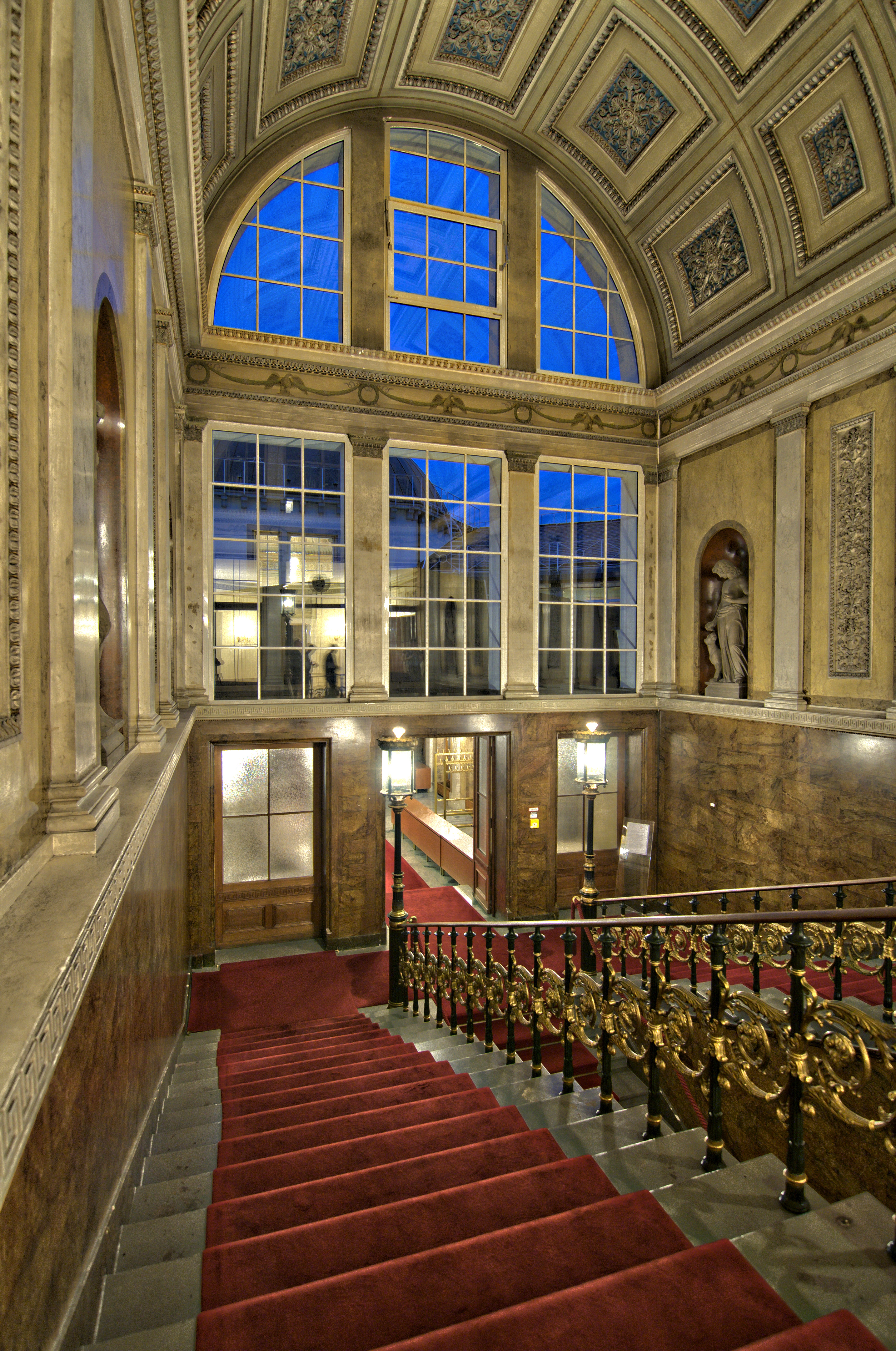 Stadtschloß Wiesbaden Wikipedia im Landtag – Hessen 26.–28. Februar 2013 in Wiesbaden Fragen zur Nachnutzung Wenn Sie Fragen zur Nachnutzung dieses Bildes haben, können Sie sich jederzeit gern an wenden